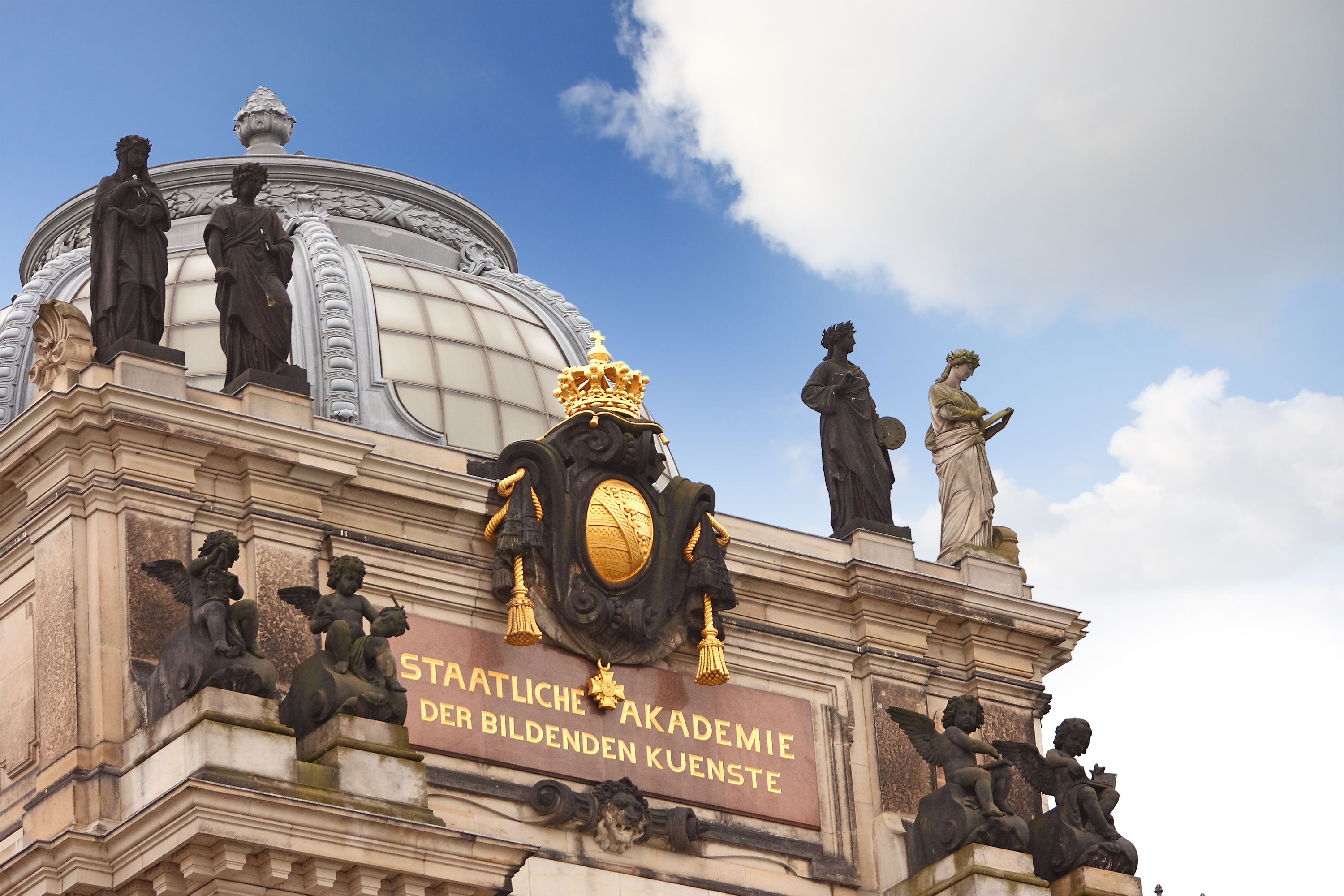 Hochschule für Bildende Künste Dresden